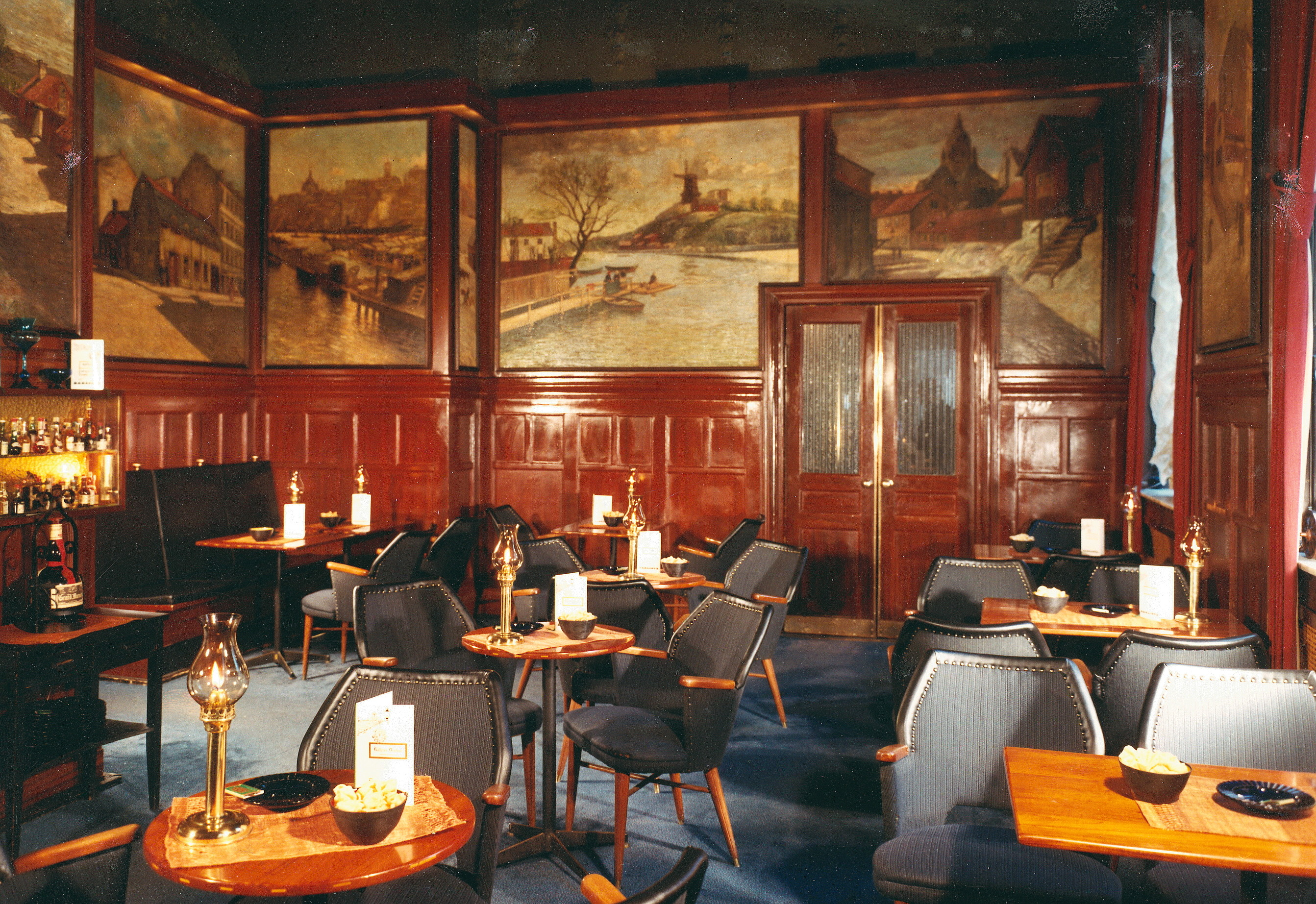 Källaren Drufvan, Götgatan 72 med väggmålningar av Carl Olof Bartels